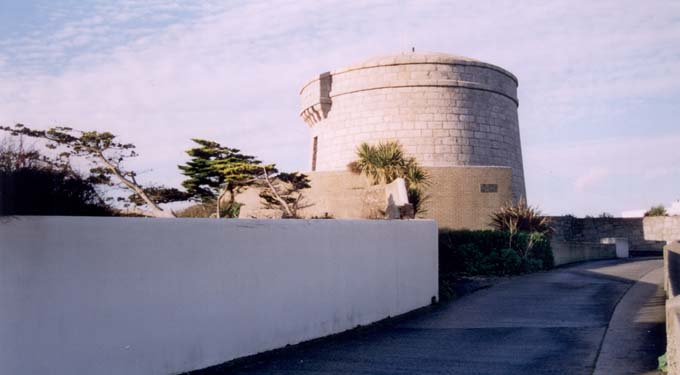 James Joyce Tower in Dun Laoghaire Fotograf/Zeichner:Silvanemesis Datum der Aufnahme: Dezember 2003